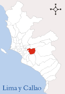 Localización del Distrito de La Molina Imagen elaborada por --Edgardo Reyes 18:44 9 mar, 2005 (CET) Categoría:Mapas del Perú (imagen)